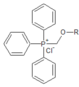 Ион трифенилфосфония, использующийся для адресной доставки антиоксидантов в митохондрии